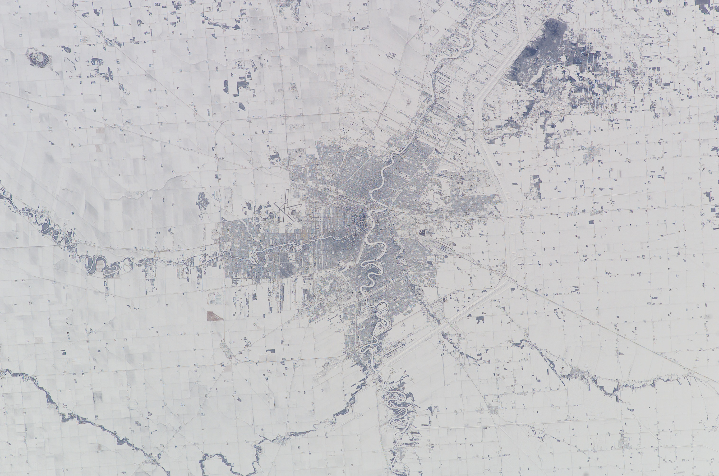 Winnipeg